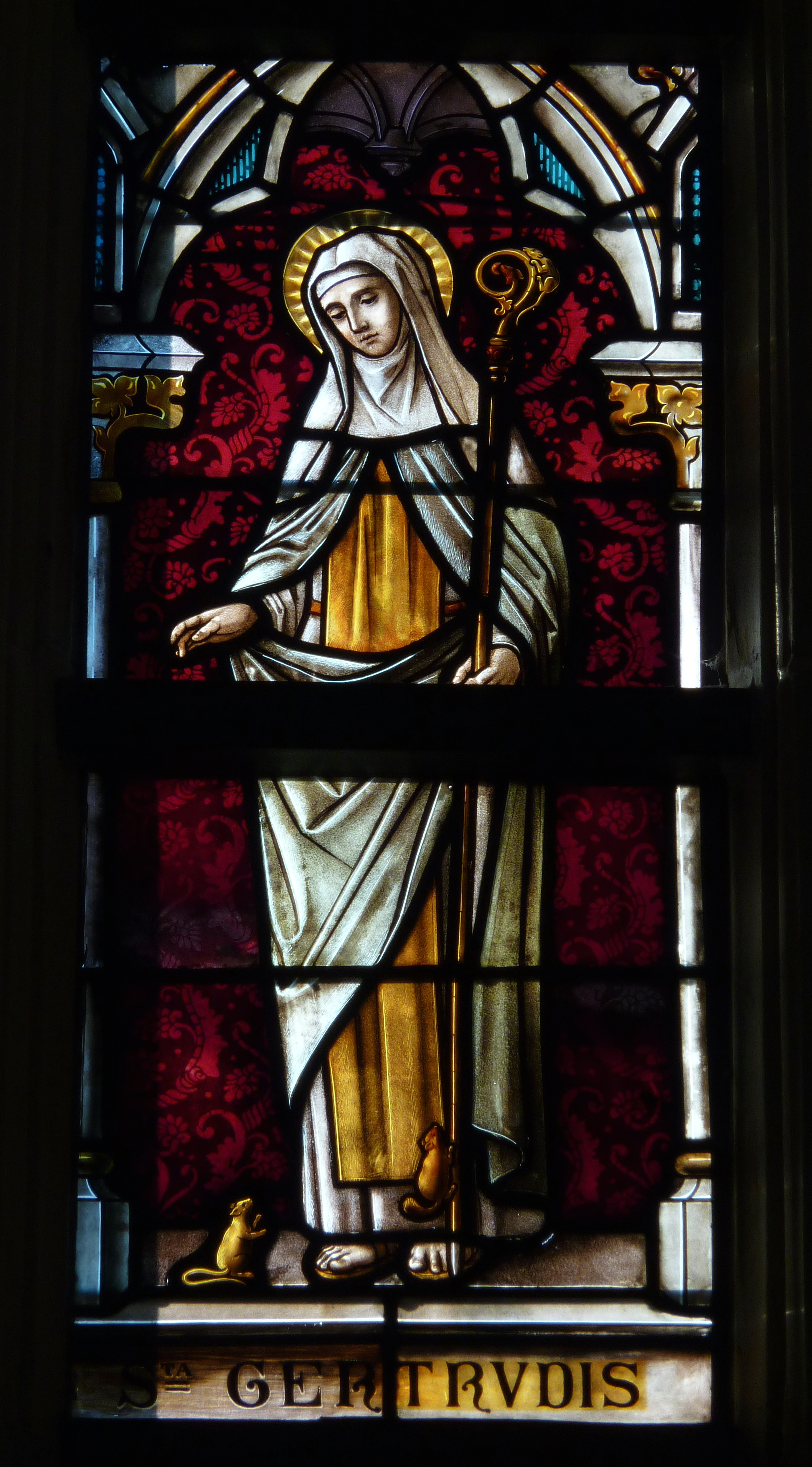 Bleiglasfenster in der Liebfrauenbasilika in Tongeren in der Provinz Limburg (Belgien) mit der Darstellung der Kreuzigung des Apostels Andreas; unterer Ausschnitt: Gertrud von Nivelles